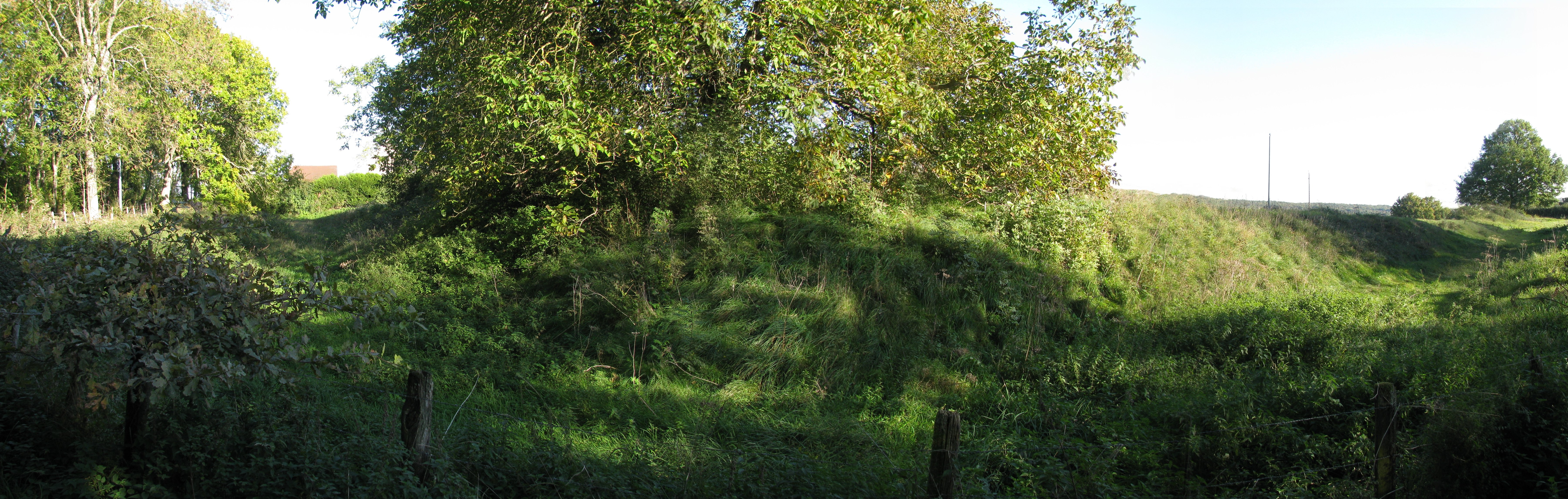 Vestiges d'un camp romain, à Champallement, Nièvre.